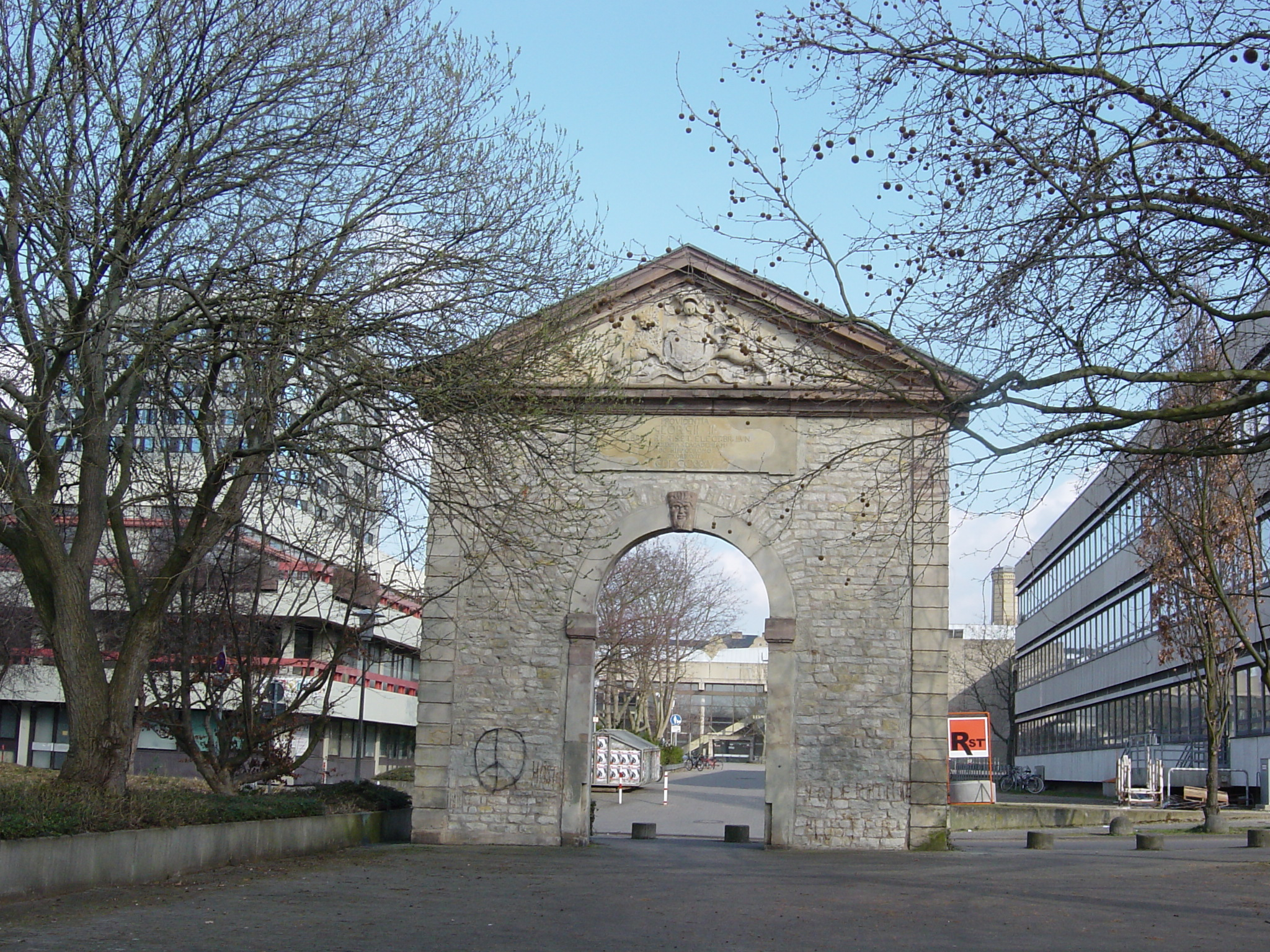 Ehemaliges Portal der Göttinger Universitätsreithalle in der Weender Straße, heute auf dem Campus.